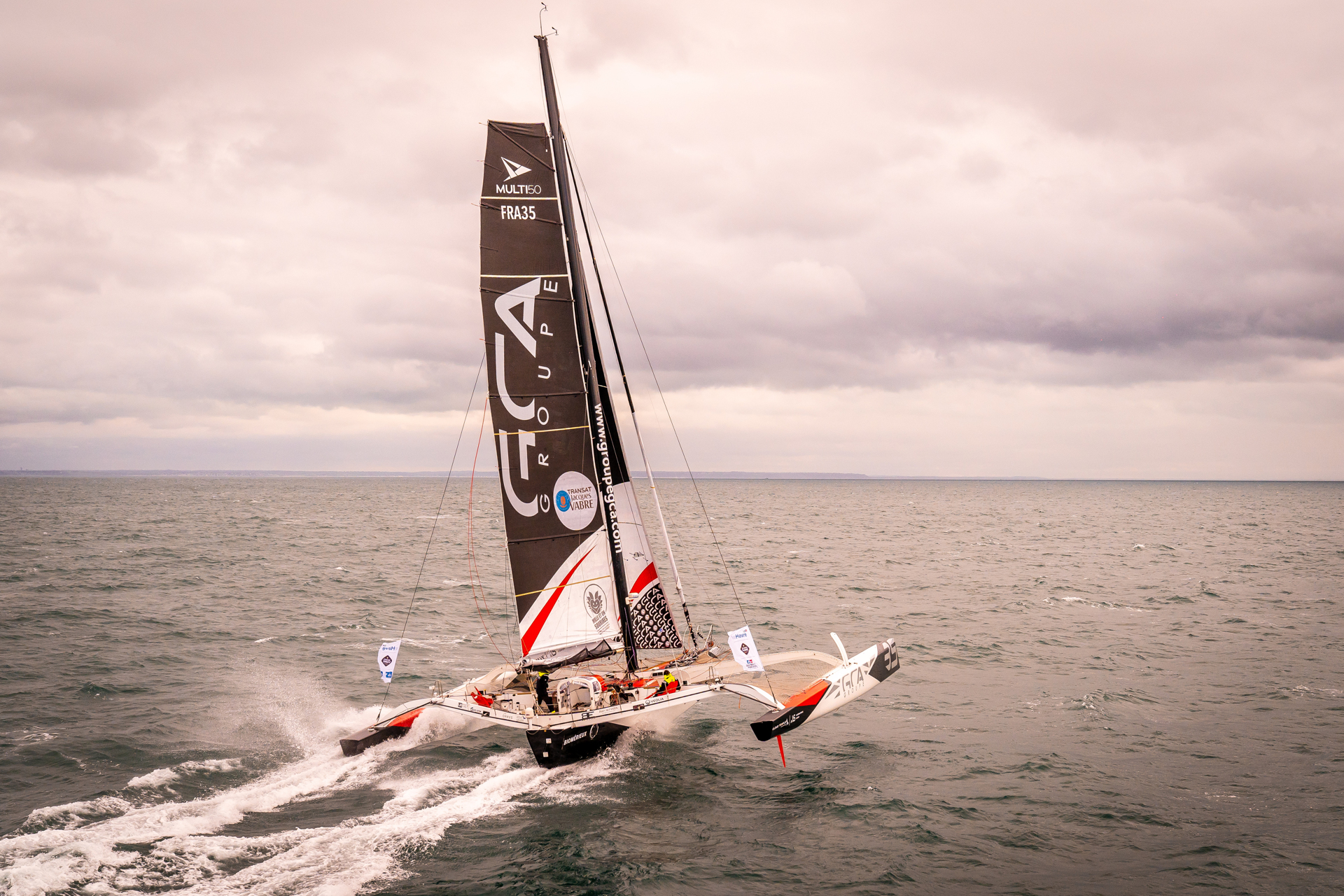 Gilles Lamire et Antoine Carpentier naviguent sur le Multi 50 Groupe GCA - Mille et Un Sourires, avant la Transat Jacques Vabre, le 16 octobre 2019. (Photo Groupe GCA)